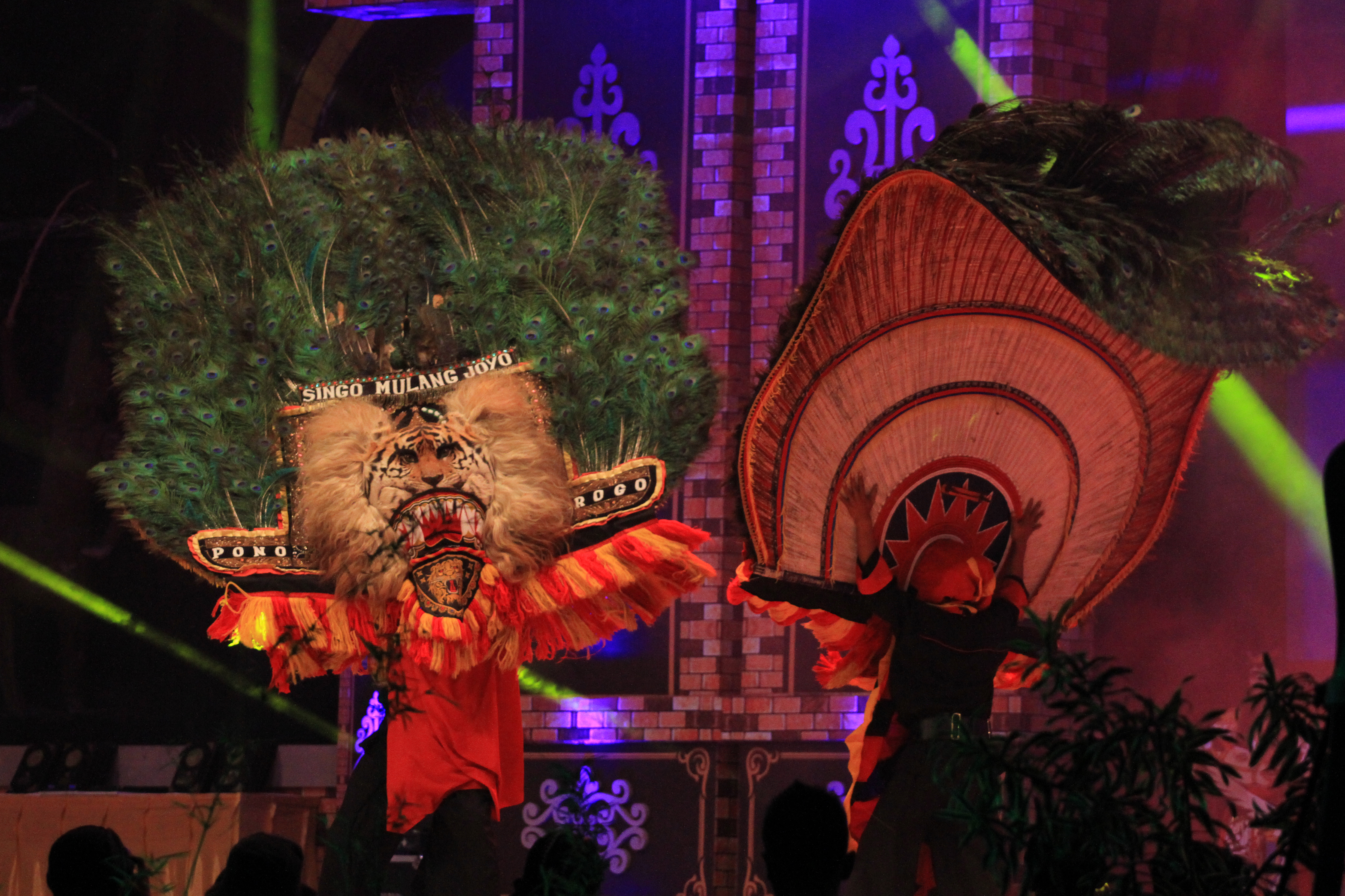 Acara puncak Grebeg Suro Ponorogo 2018 yang digelar di halaman alun-alun kota Ponorogo sekaligus penampilan peserta festival reog nasional 2018.